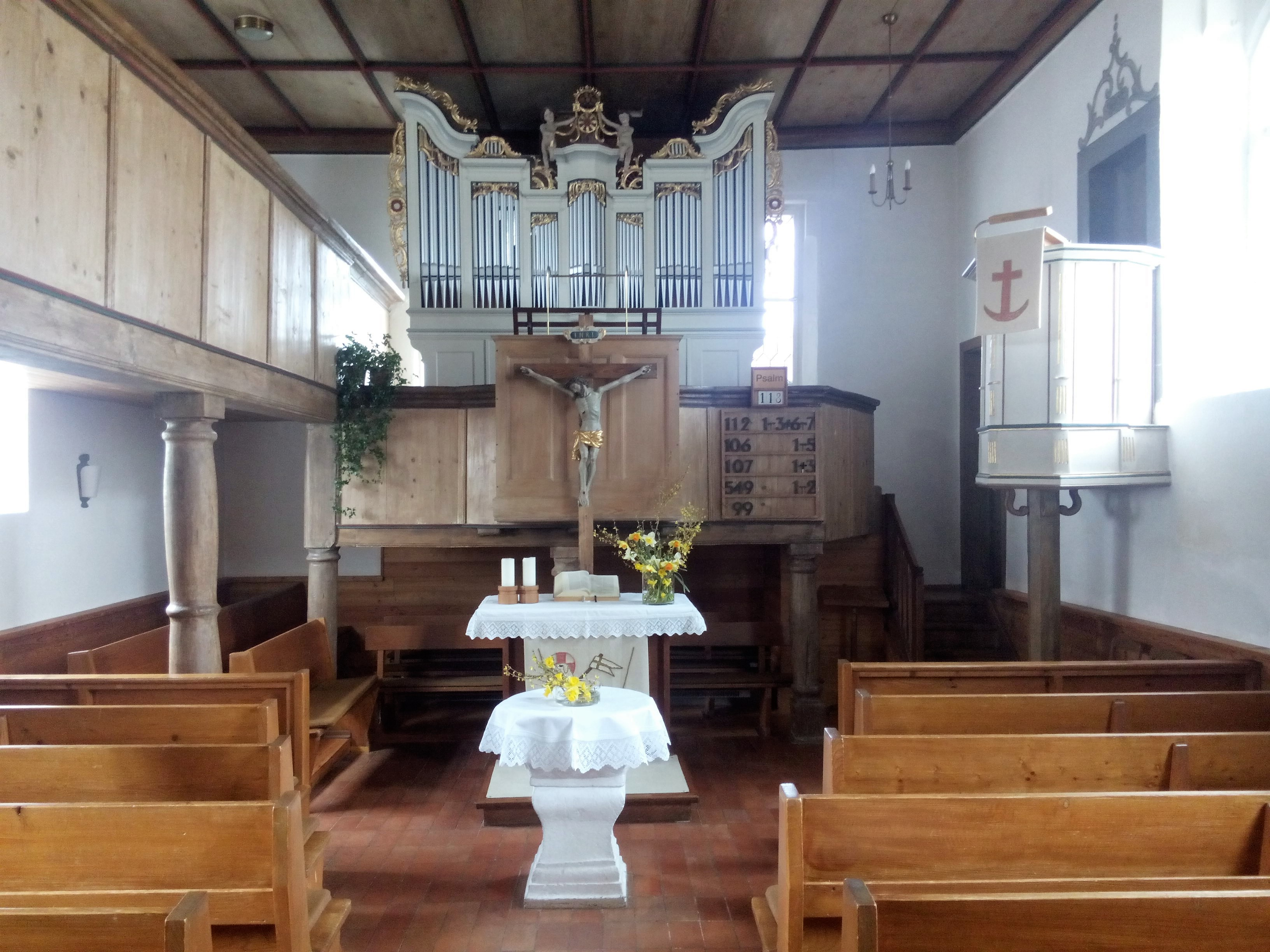 Orgelempore hinter dem Altar. 2 Sitzbänke unter der Orgelempore. Taufstein direkt vor dem Altar.